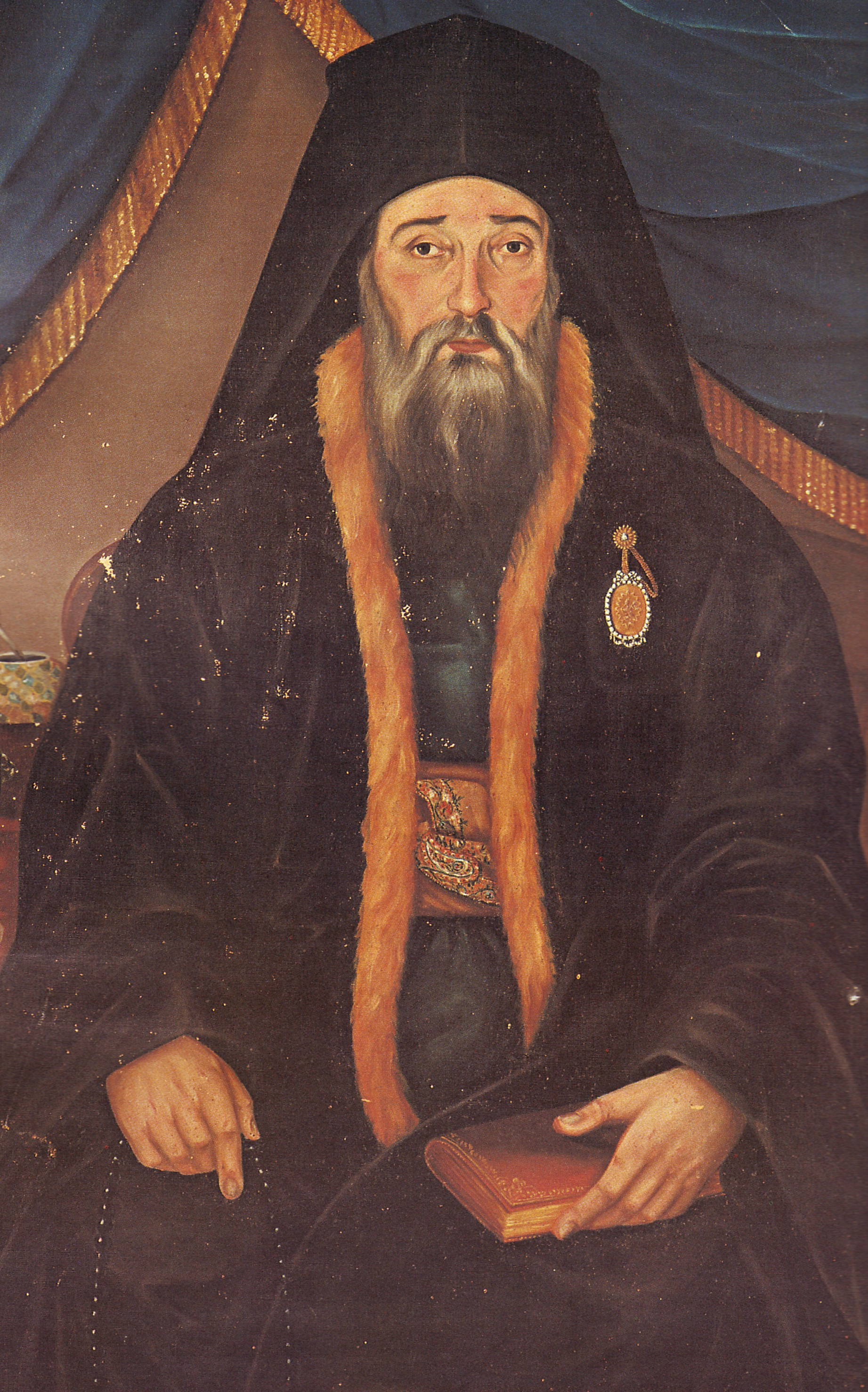 Ecumenical Patriarch Germanus IV